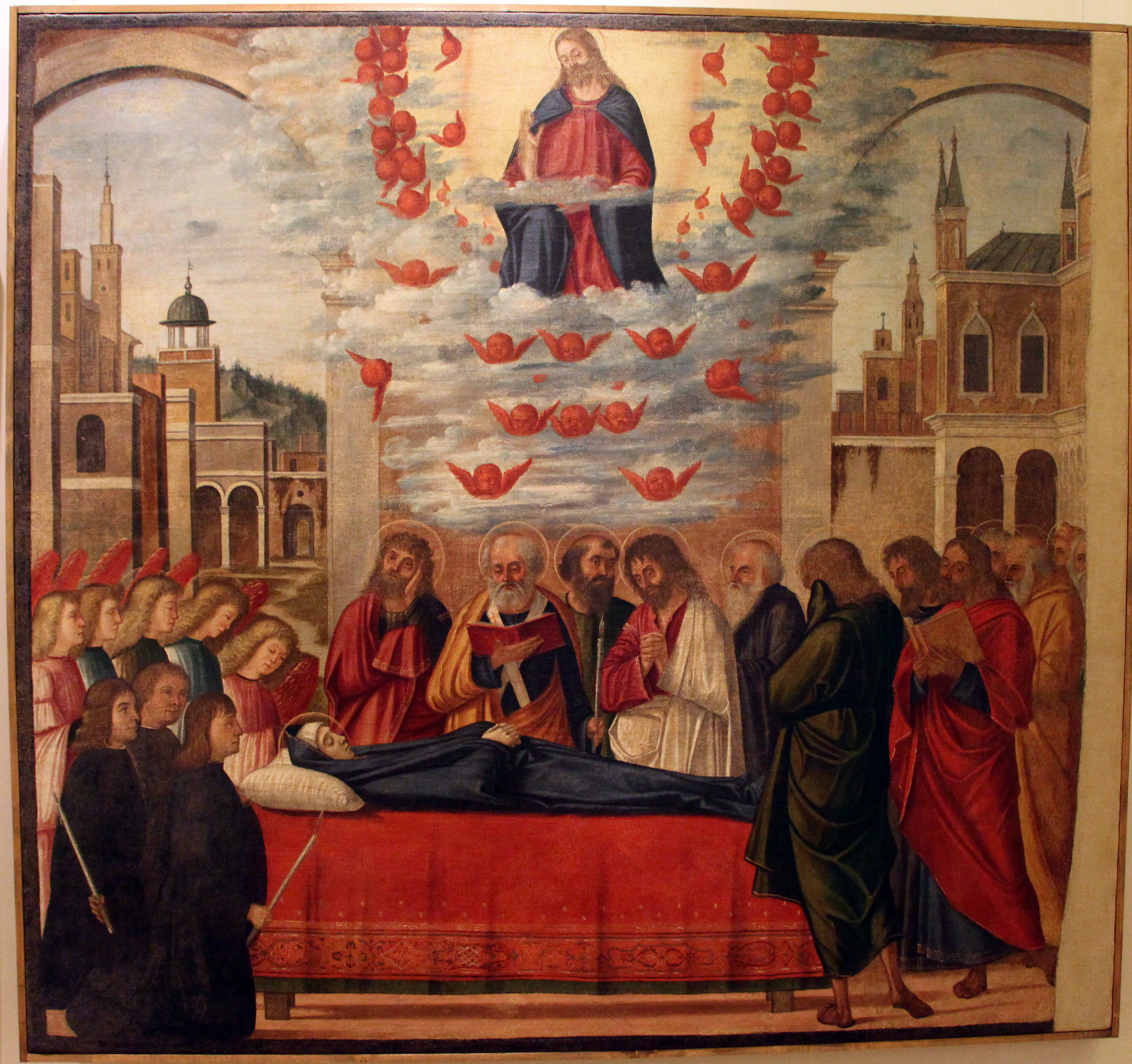 Galleria G. Franchetti alla Ca' d'Oro - MIBAC The making of this document was supported by Wikimedia CH. (Submit your project!) For all the files concerned, please see the category Supported by Wikimedia CH. This is a photo of a monument which is part of cultural heritage of Italy.